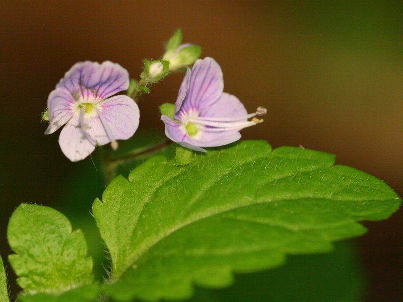 Berg-Ehrenpreis (Veronica montana)